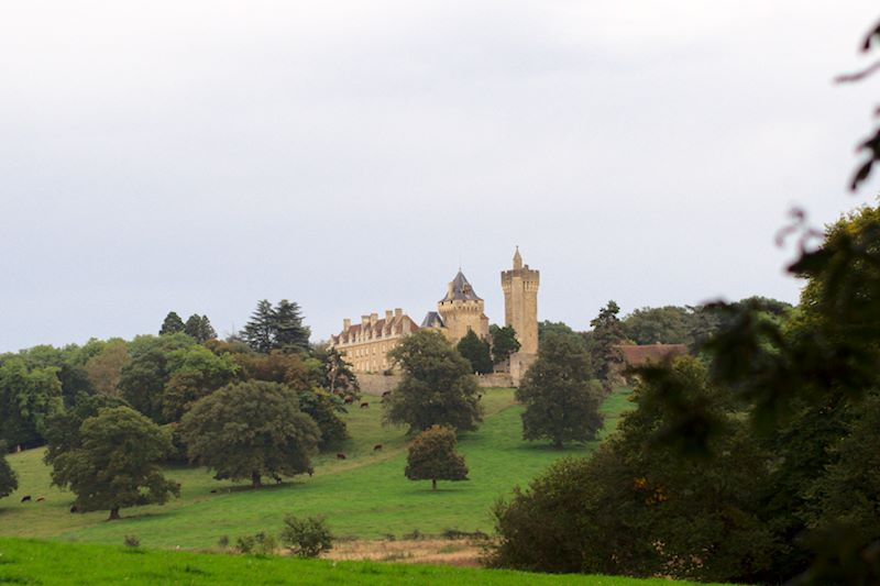 Château du Plessis (Inscrit) .